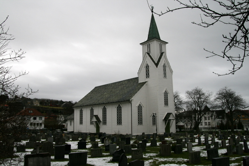 Os kyrkje